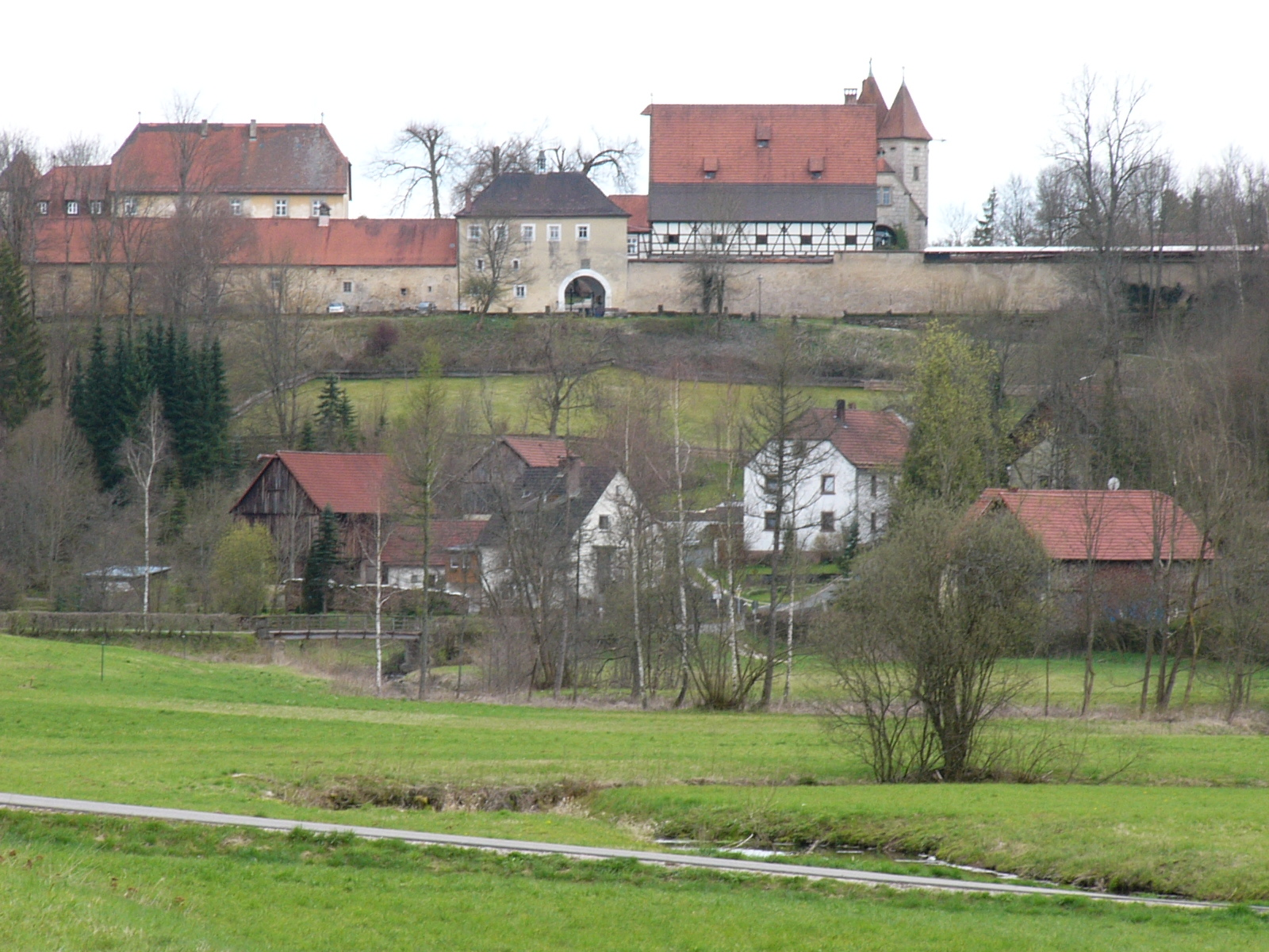 Ansicht von Schloß Oberaufseß